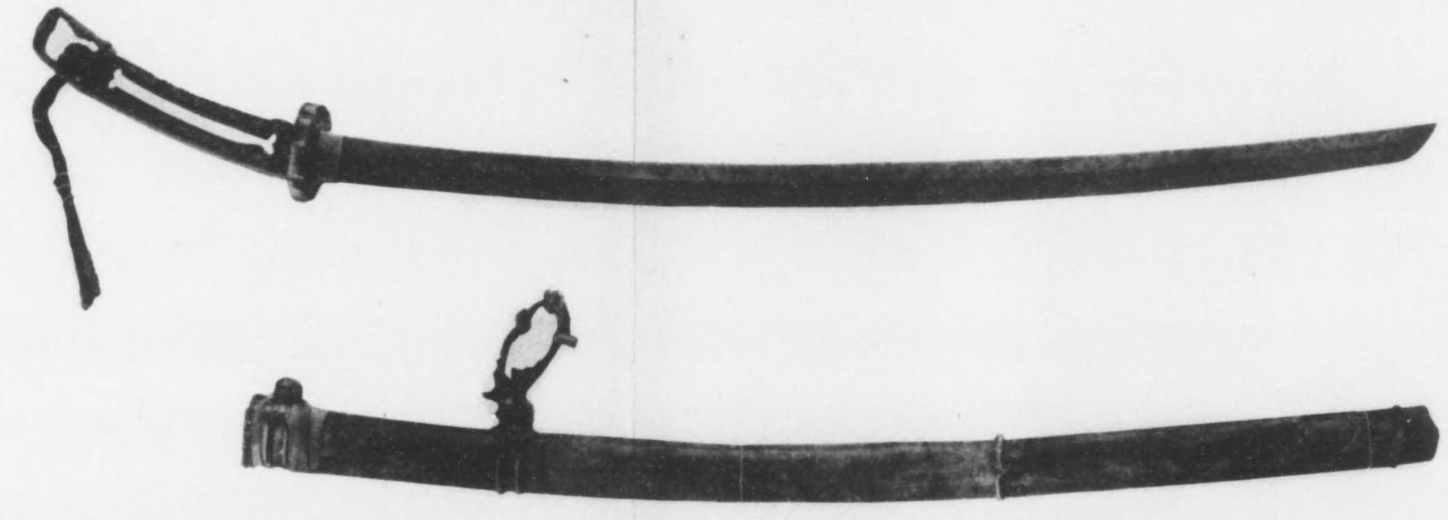 三重県伊勢市・伊勢神宮所蔵の毛抜形太刀（重要文化財）の刀身と鞘。平安時代の作。